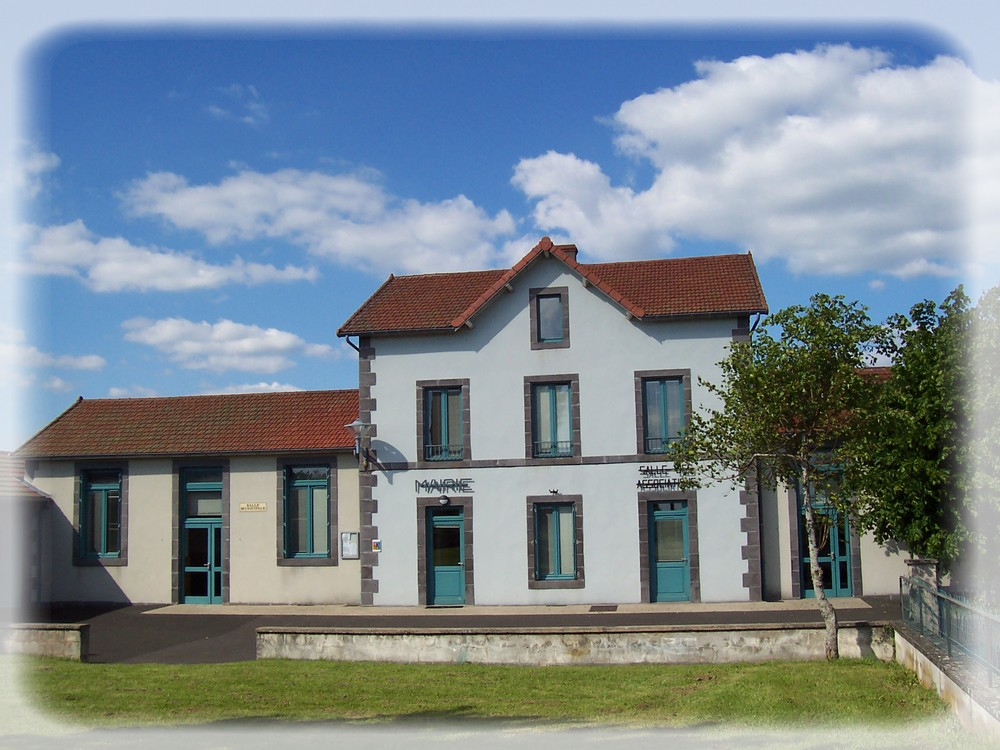 Mairie de Puy Saint Gulmier